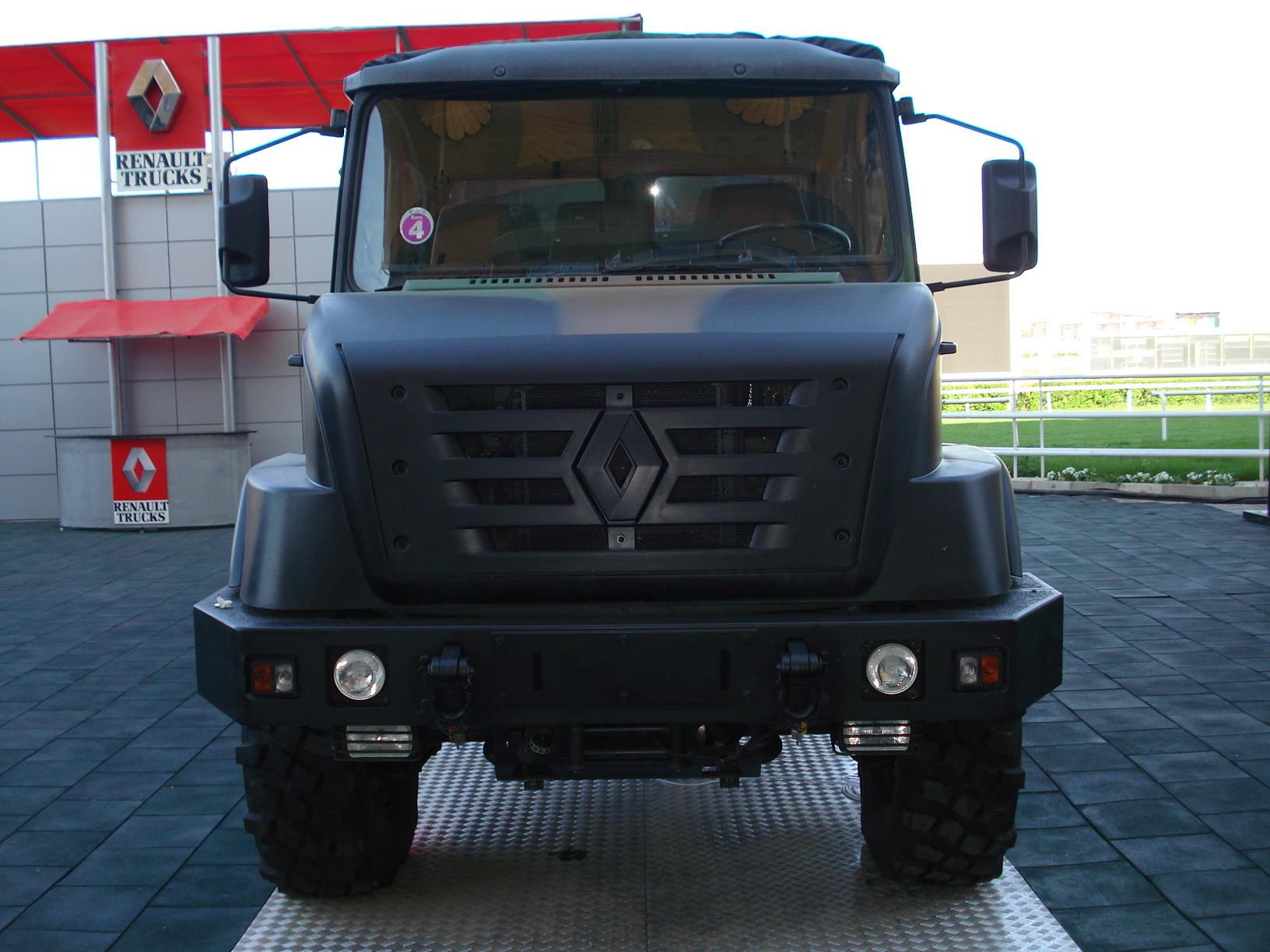 IDEF '07 Savunma Fuarı'nda çekildi. Renault War Truck. 23 Mayıs 2007